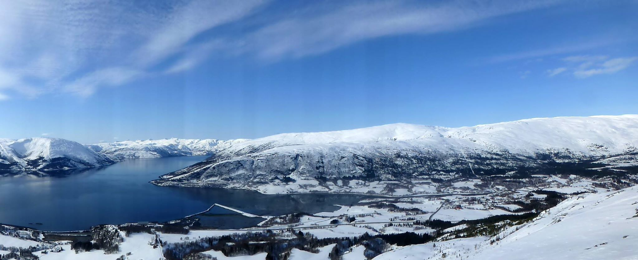 Panorama Holandsvika vinter